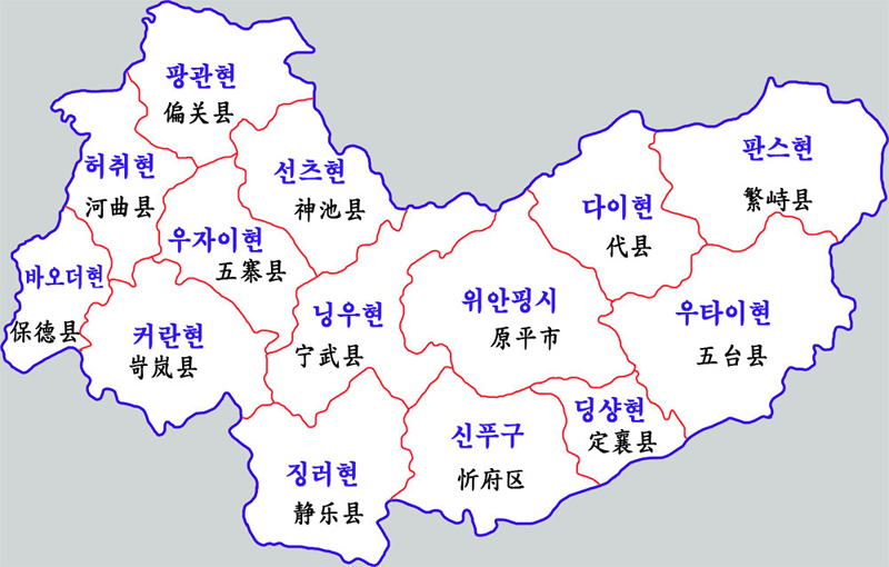 신저우시 현급구역도